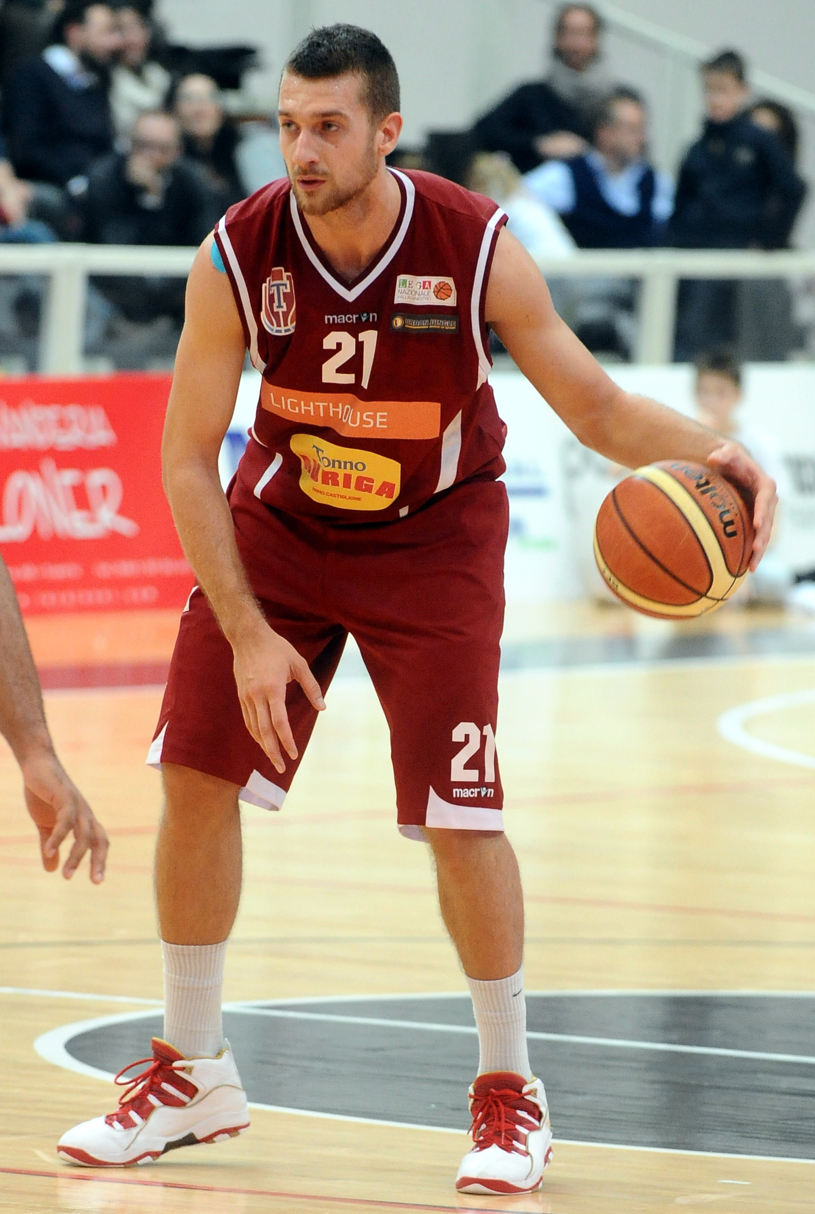 Giancarlo Ferrero durante una partita della Pallacanestro Trapani contro l'Aquila Basket Trento.